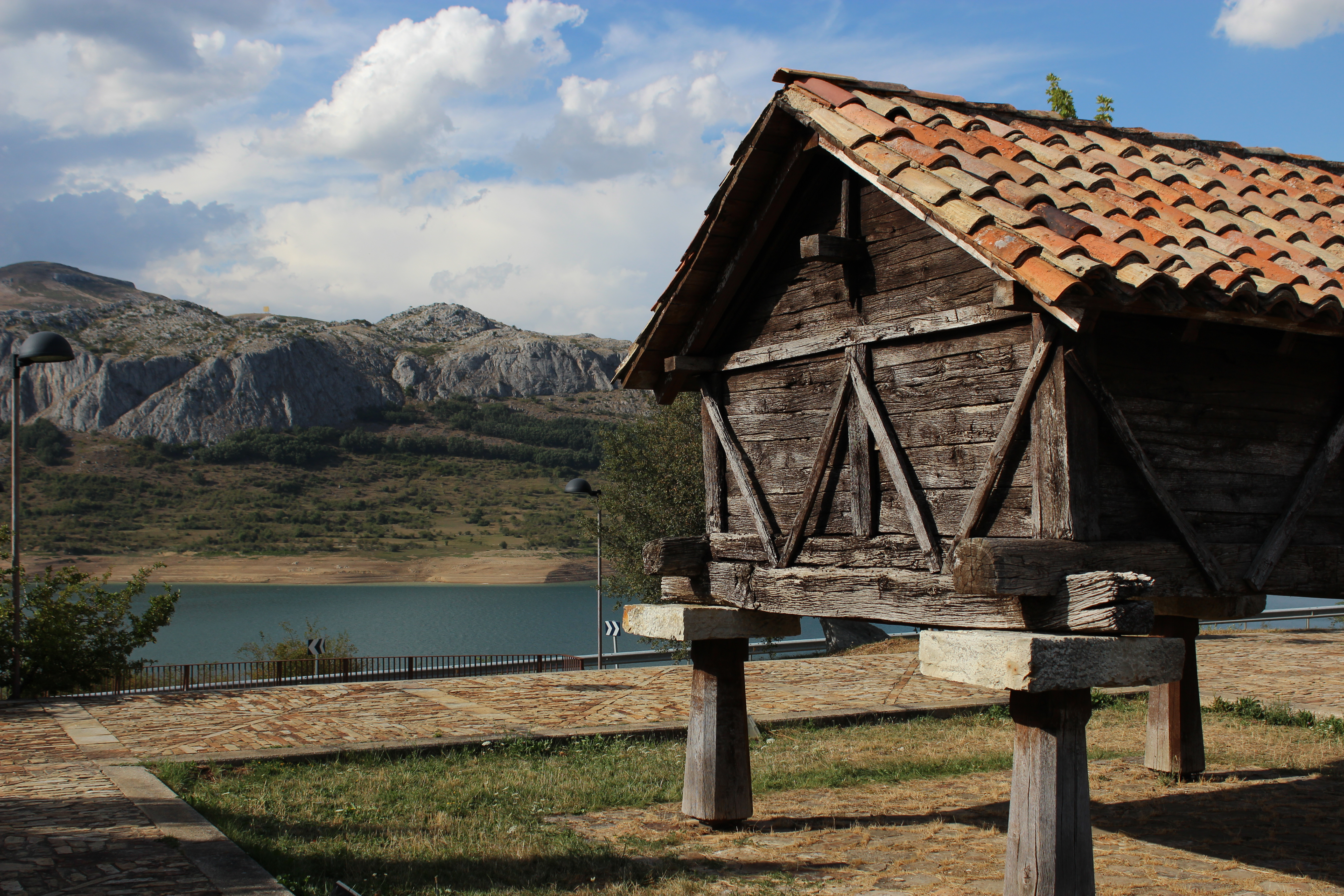 Horreo tradicional reconstruido en Riaño.